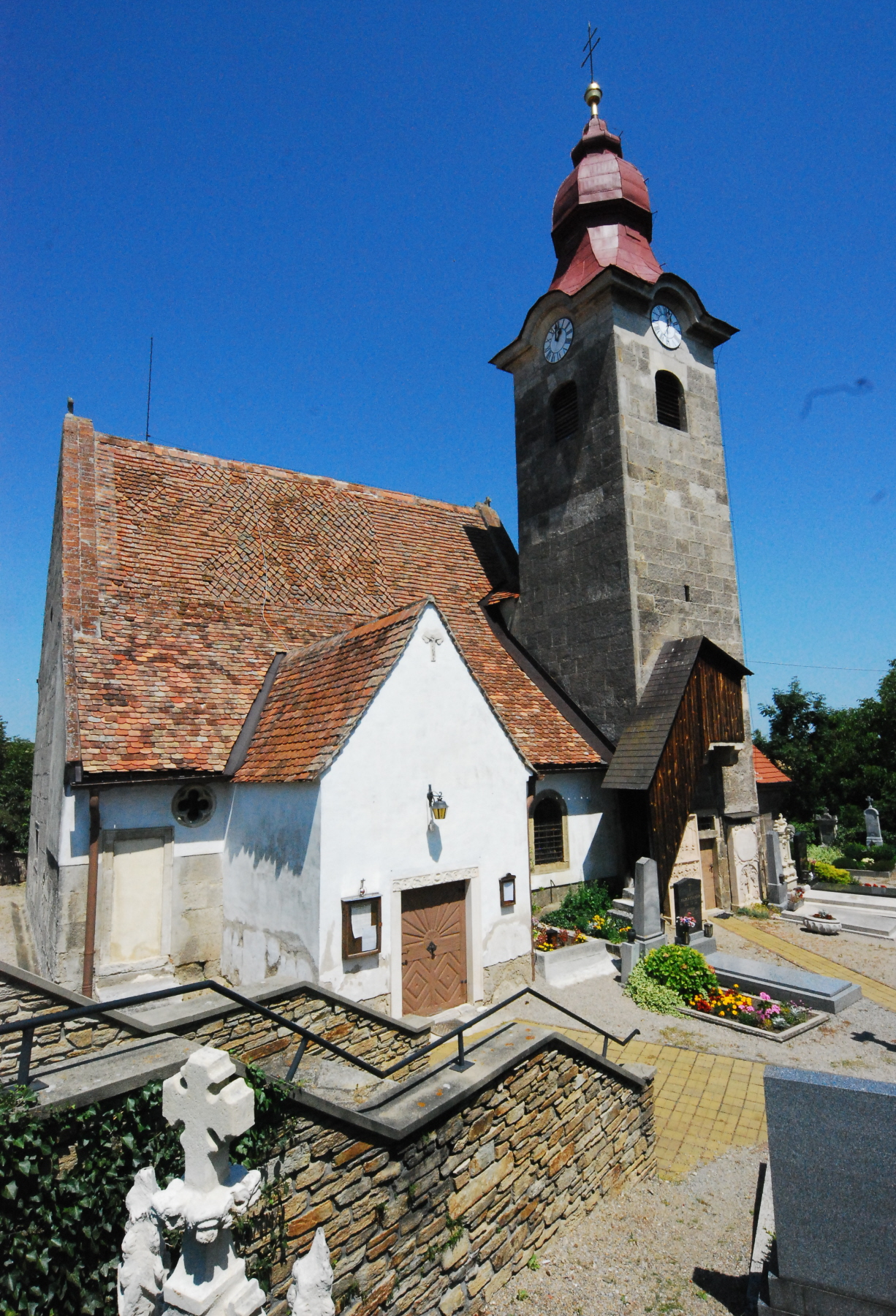 Kirche von Kühnring in Niederösterreich